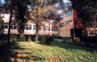 ТШ ”Јован Вукановић” у улици Браће Рибникар у Новом Саду